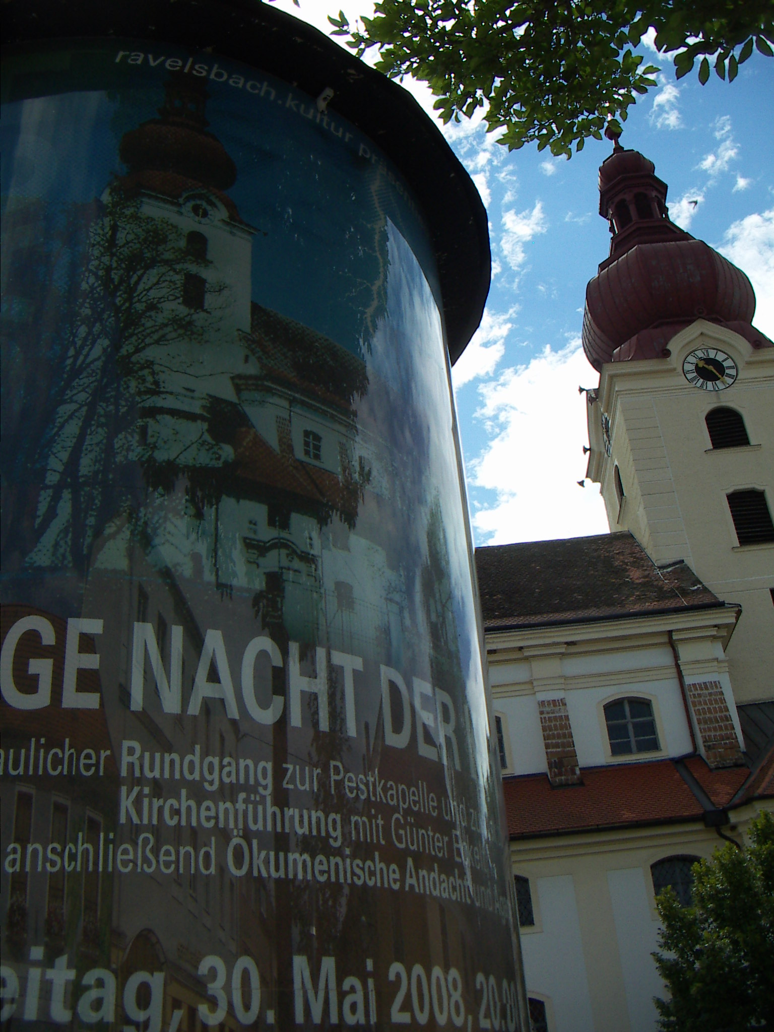 Pfarrkirche Ravelsbach, Lange Nacht der Kirchen 2008